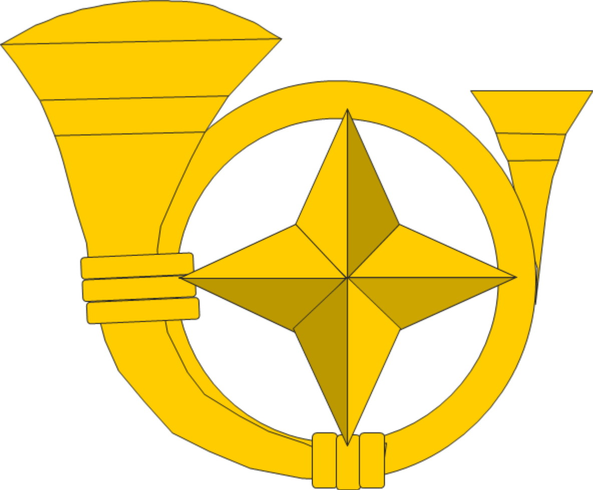 Lapin Jääkäripataljoonan joukko-osastotunnus vuosina 1967- 1983